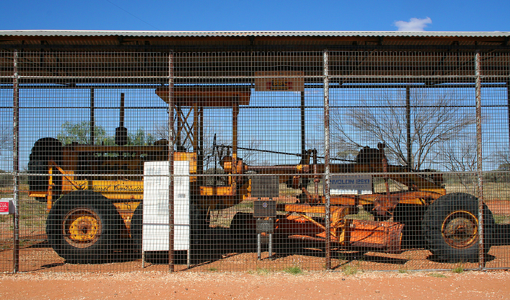 Len Beadells Grader at Giles Meteorological Station (WA)